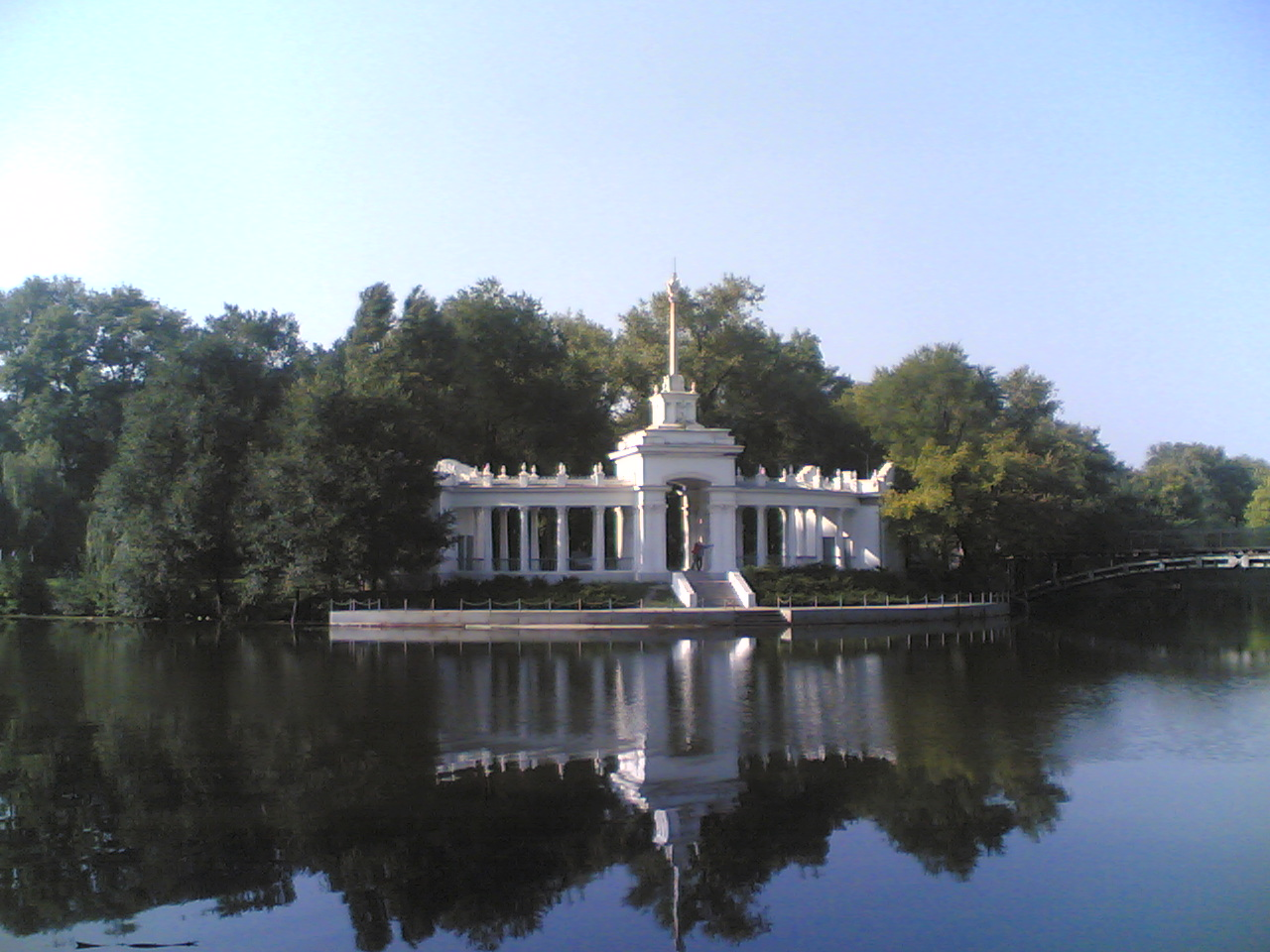 Река Ингулец